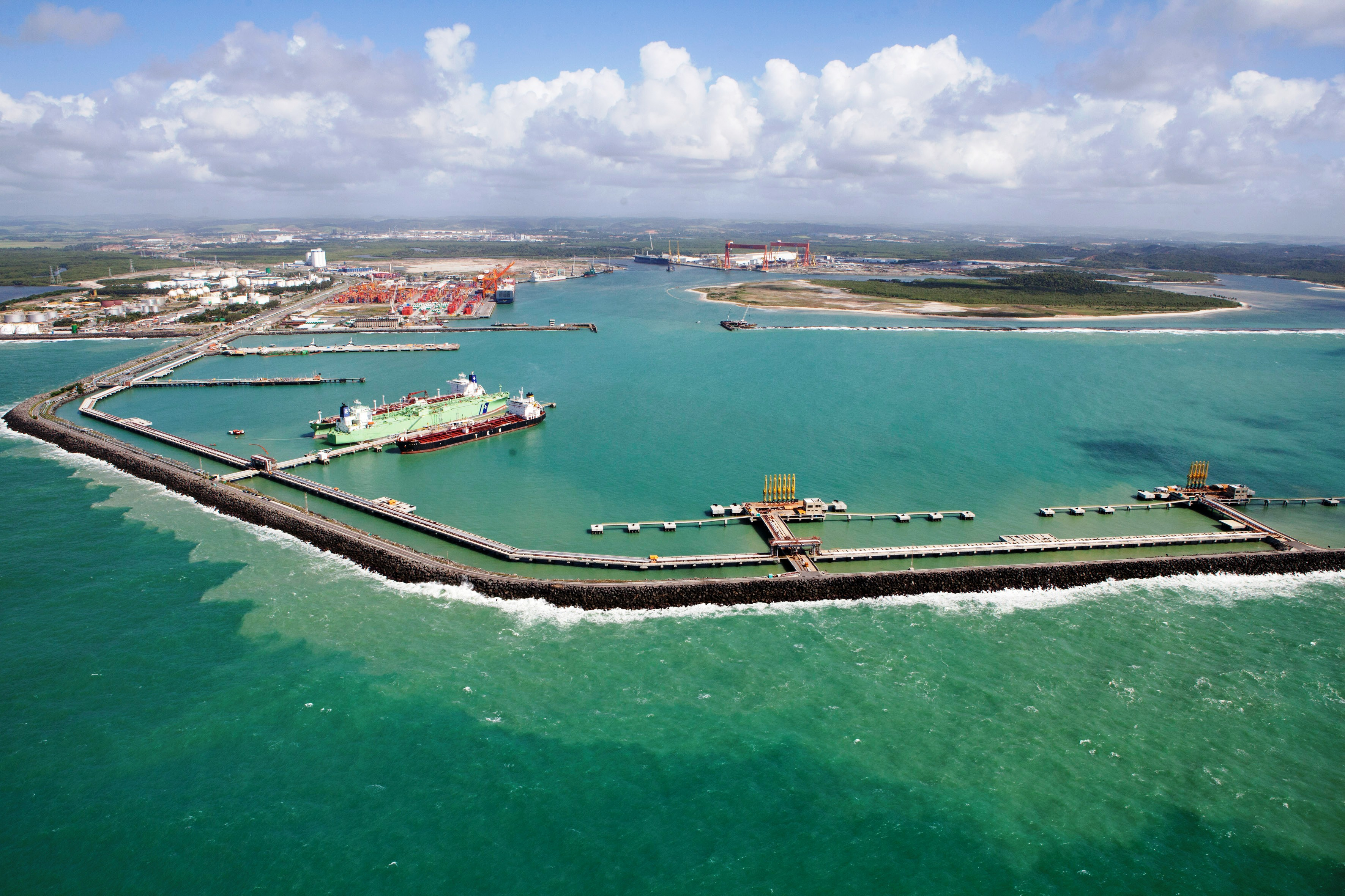 Foto:Daniela Nader